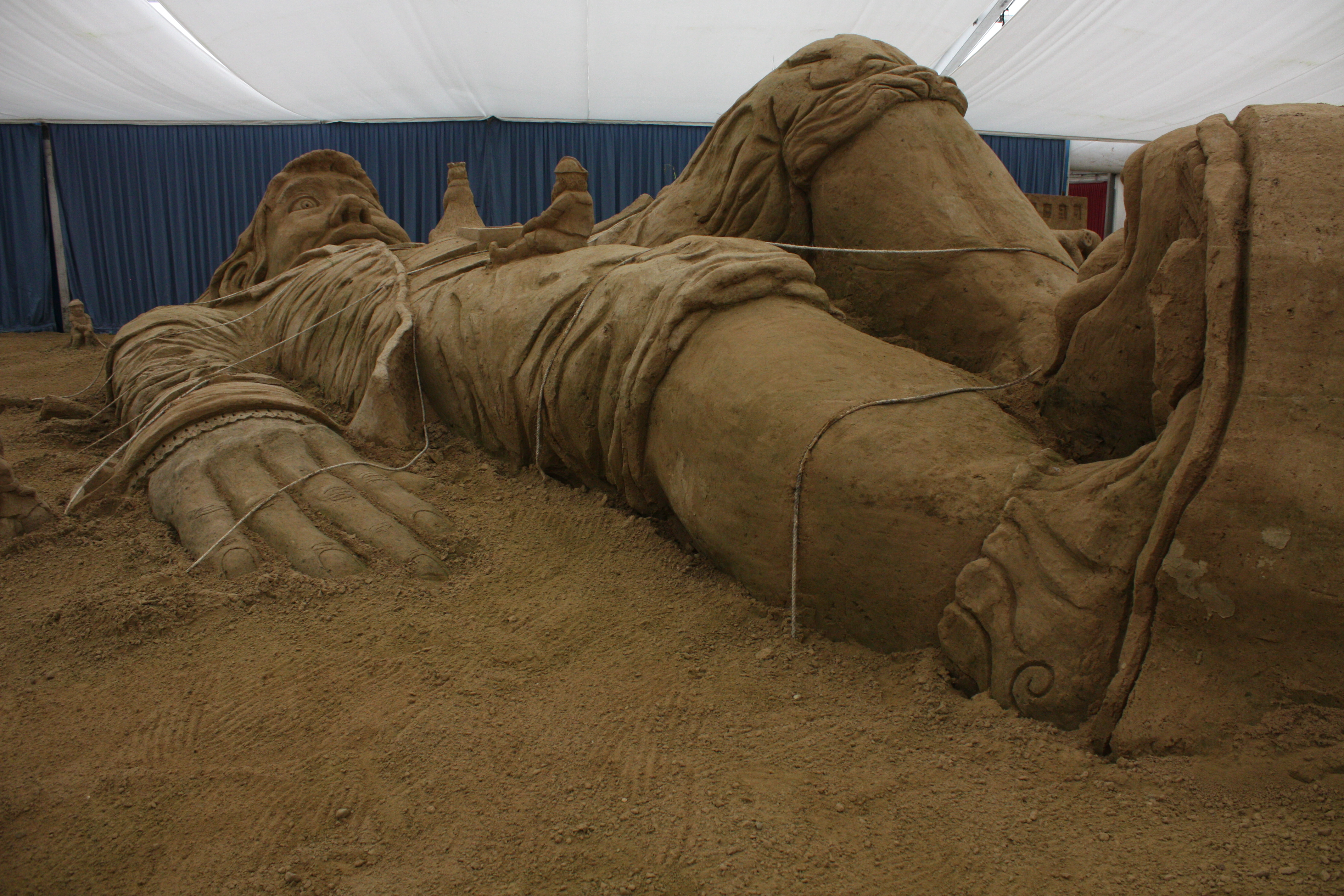 Sandskulptur: Gulliver im Land der Zwerge